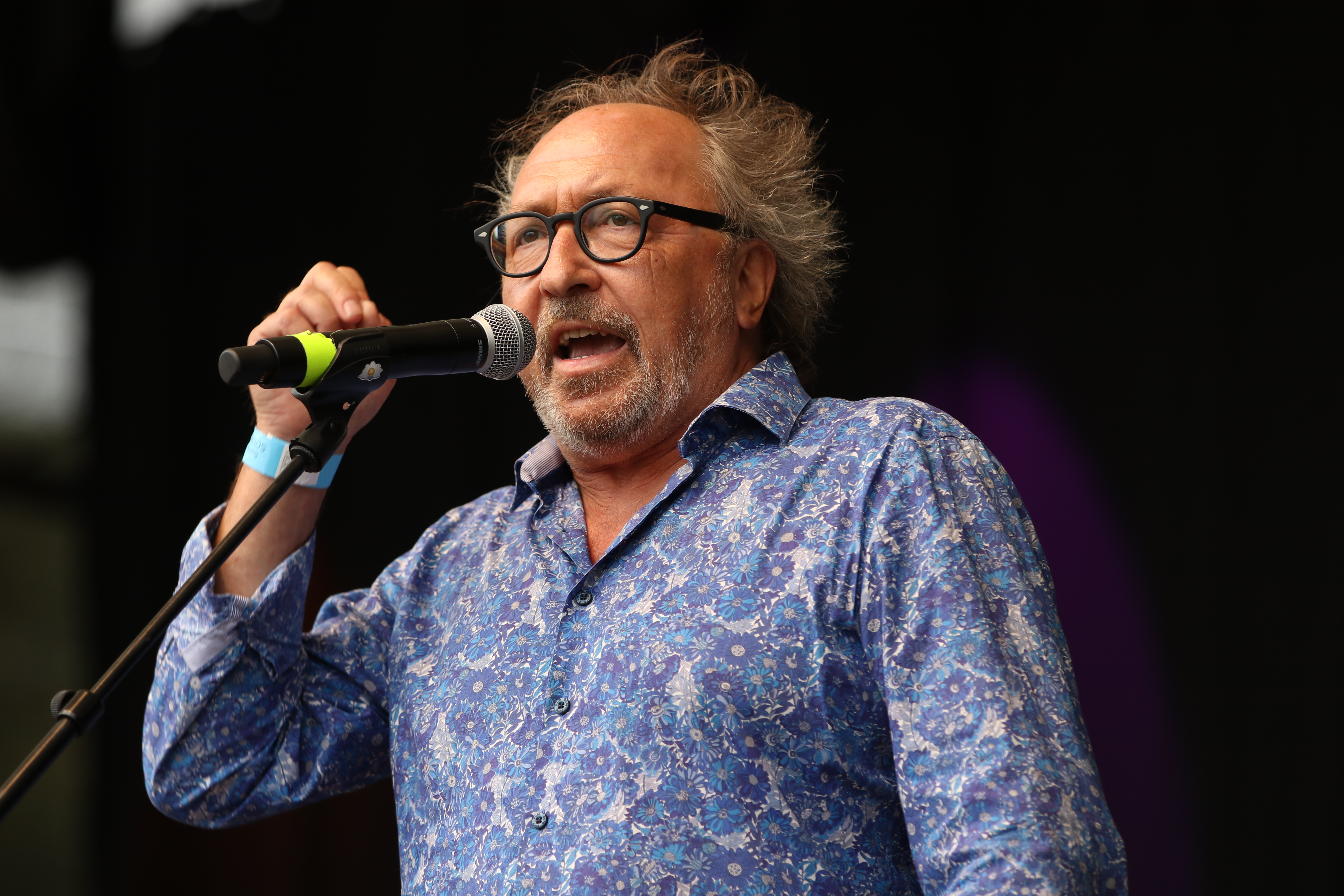 Ausgehetzt, Demonstration in München am 22. Juli 2018 gegen den Rechtsruck in der bayerischen Politik